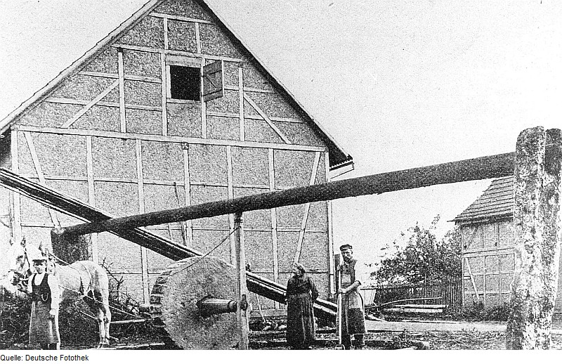 Original image description from the Deutsche FotothekPferdingsleben. Waidmühle, die letzte in Deutschland, aus: Der Leipziger vom 25. Jan. 1908